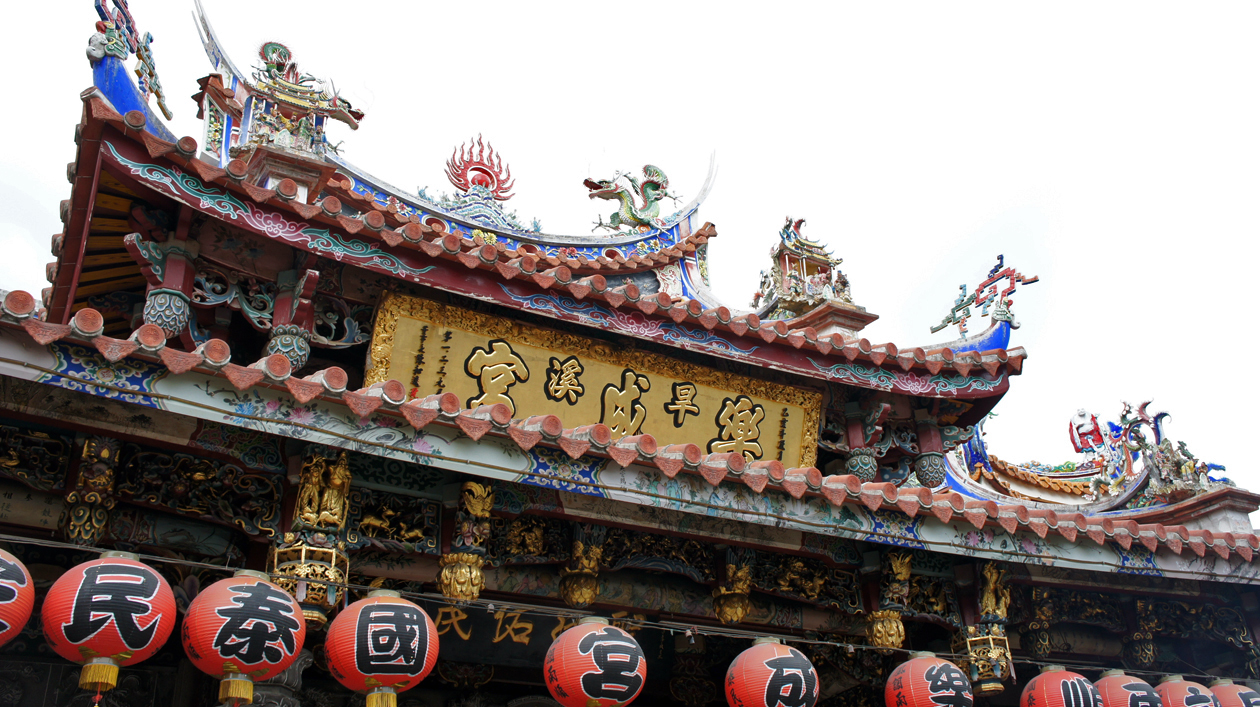 台中樂成宮